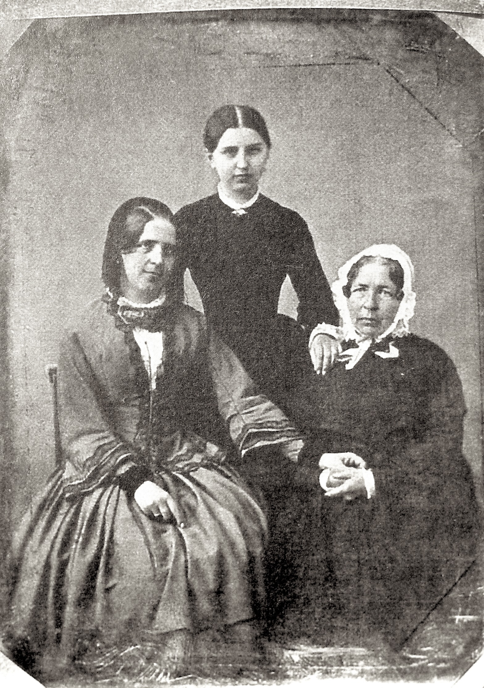 Johanna Spyri im Alter von ca. 25 Jahren. Rechts Mutter Meta Heusser-Schweizer, dahinter Schwester Meta, 1836 - 1904